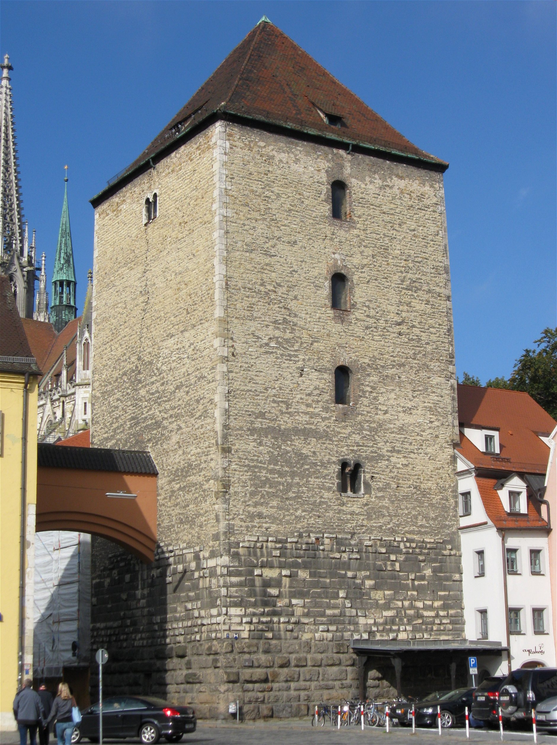 Domstraße 3; sog. Römerturm, Pfalzturm, sechsgeschossiger Quader- und Bruchsteinbau mit Zeltdach, um 1210, wohl auf karolingischem Unterbau der 2. Hälfte 9. Jh.